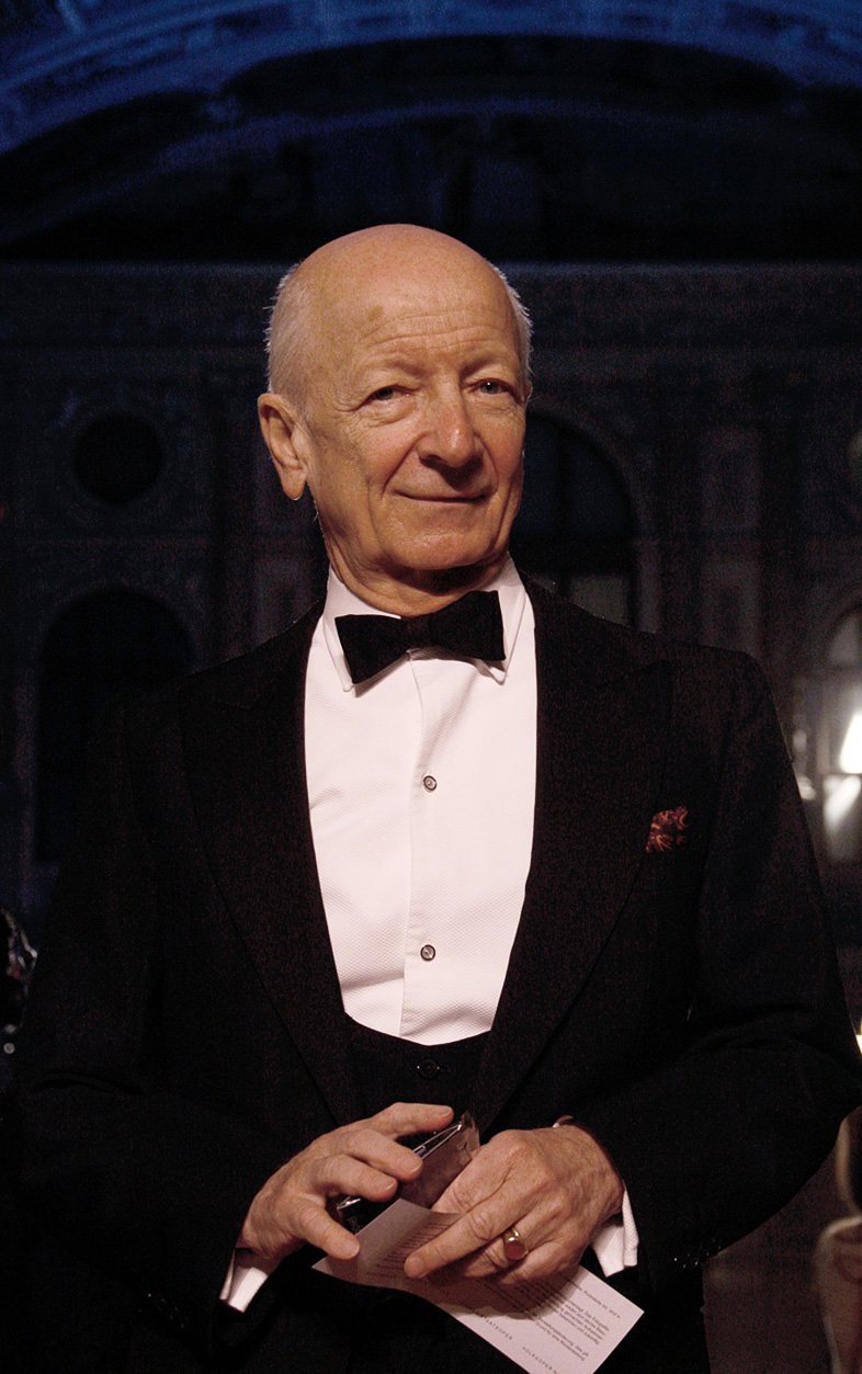 Peter Matić zu Gast bei der Verleihung des Nestroy-Theaterpreises 2010 im Burgtheater in Wien.